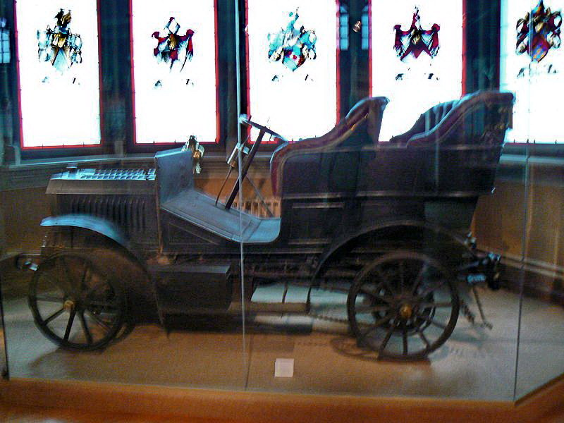 Voiture du musée de Haguenau (véhicule du maire Nessel) [1]